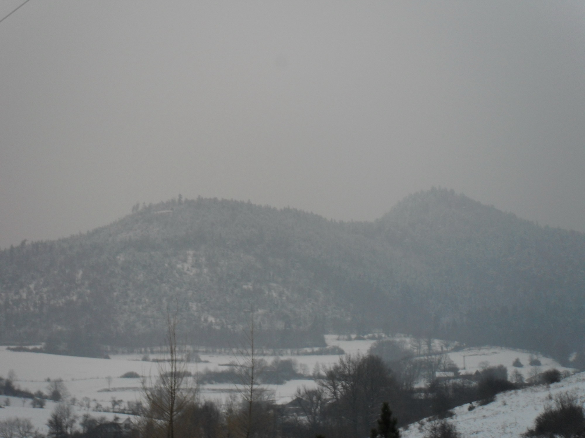 Rittempierre et Roche des Corbeaux observée par un jour de neige depuis le chemin de la ferme de la Goulle, Saint-Dié